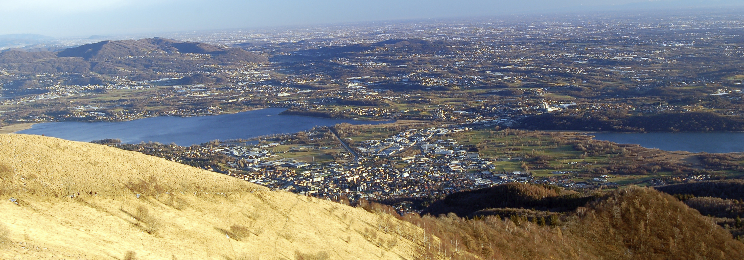 Vista su Erba dal monte Bollettone